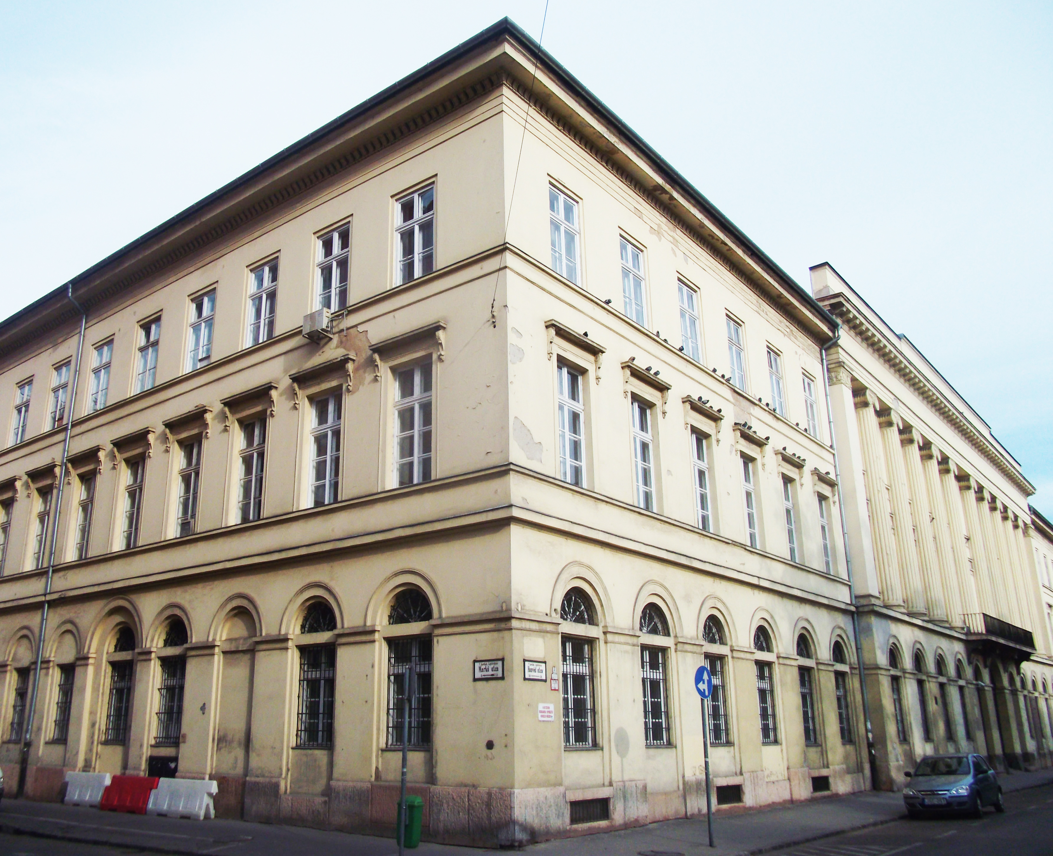 Valero selyemgyár This is a photo of a monument in Hungary. Identifier: 482